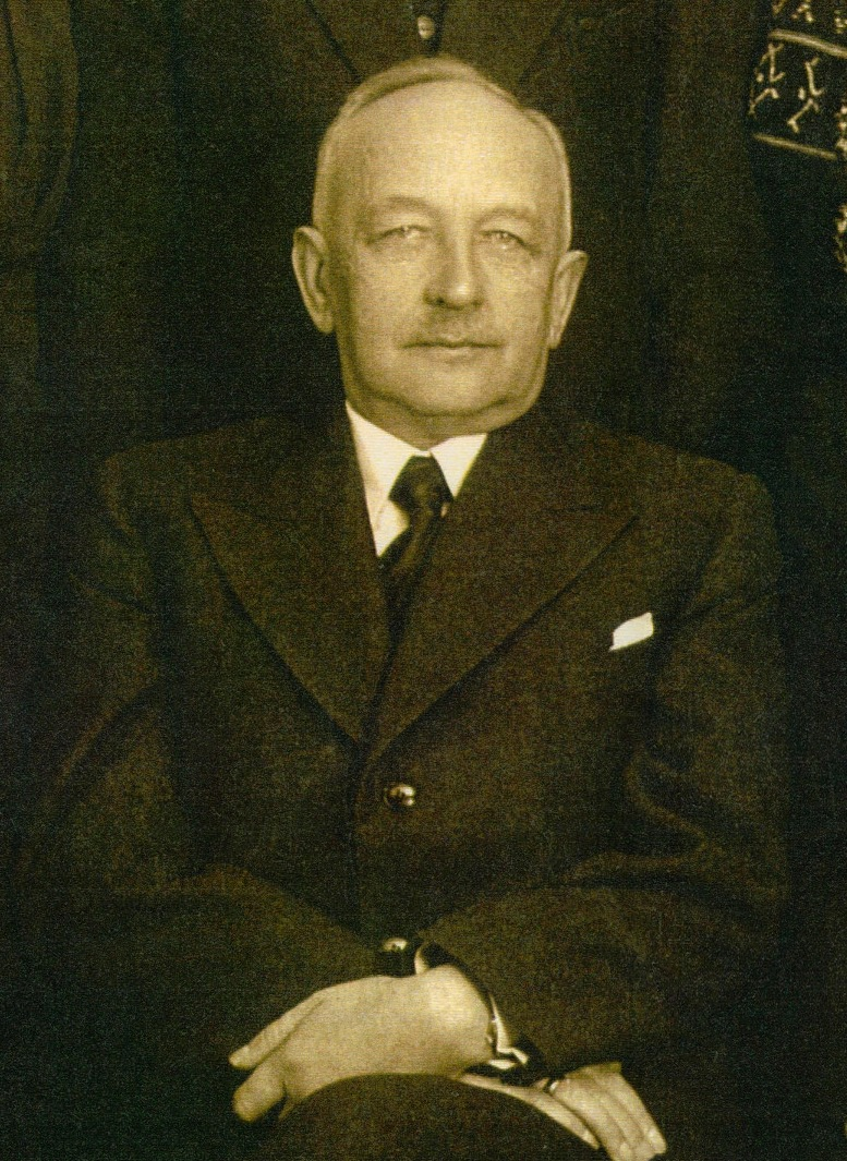 Nikolai Langebraun